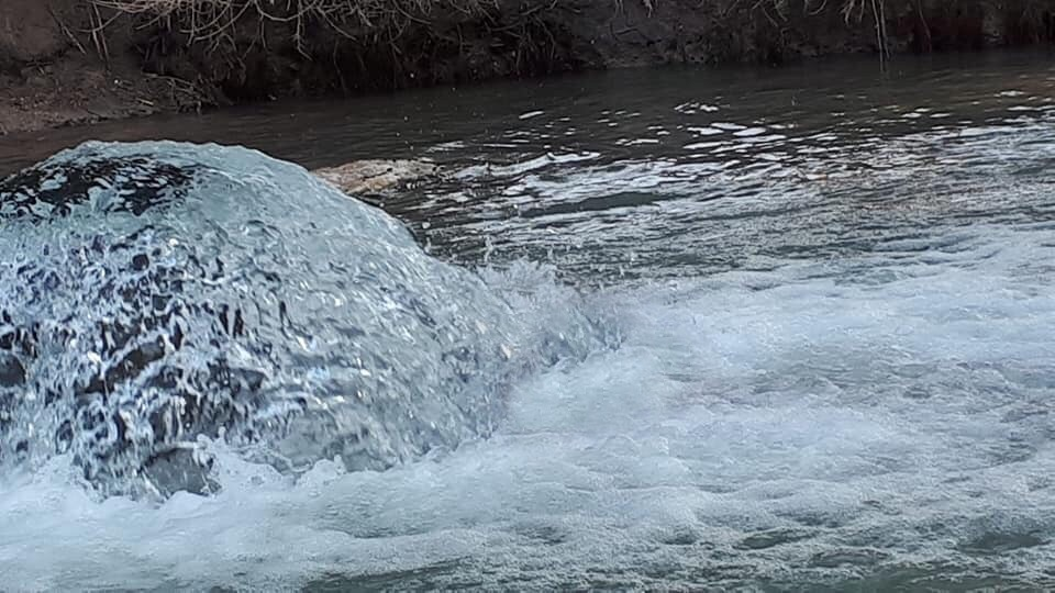 צינור זה מוביל את המים לבריכה קטנה עם גישה נוחה לטבילה